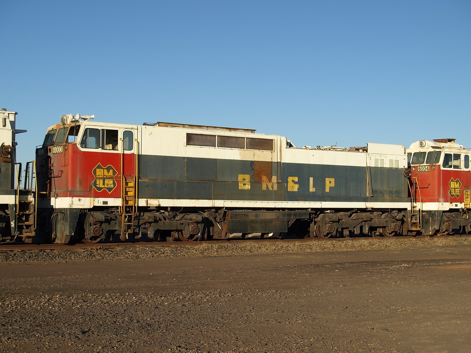 Black Mesa & Lake Powell E60CF, abgestellt in Page, AZ